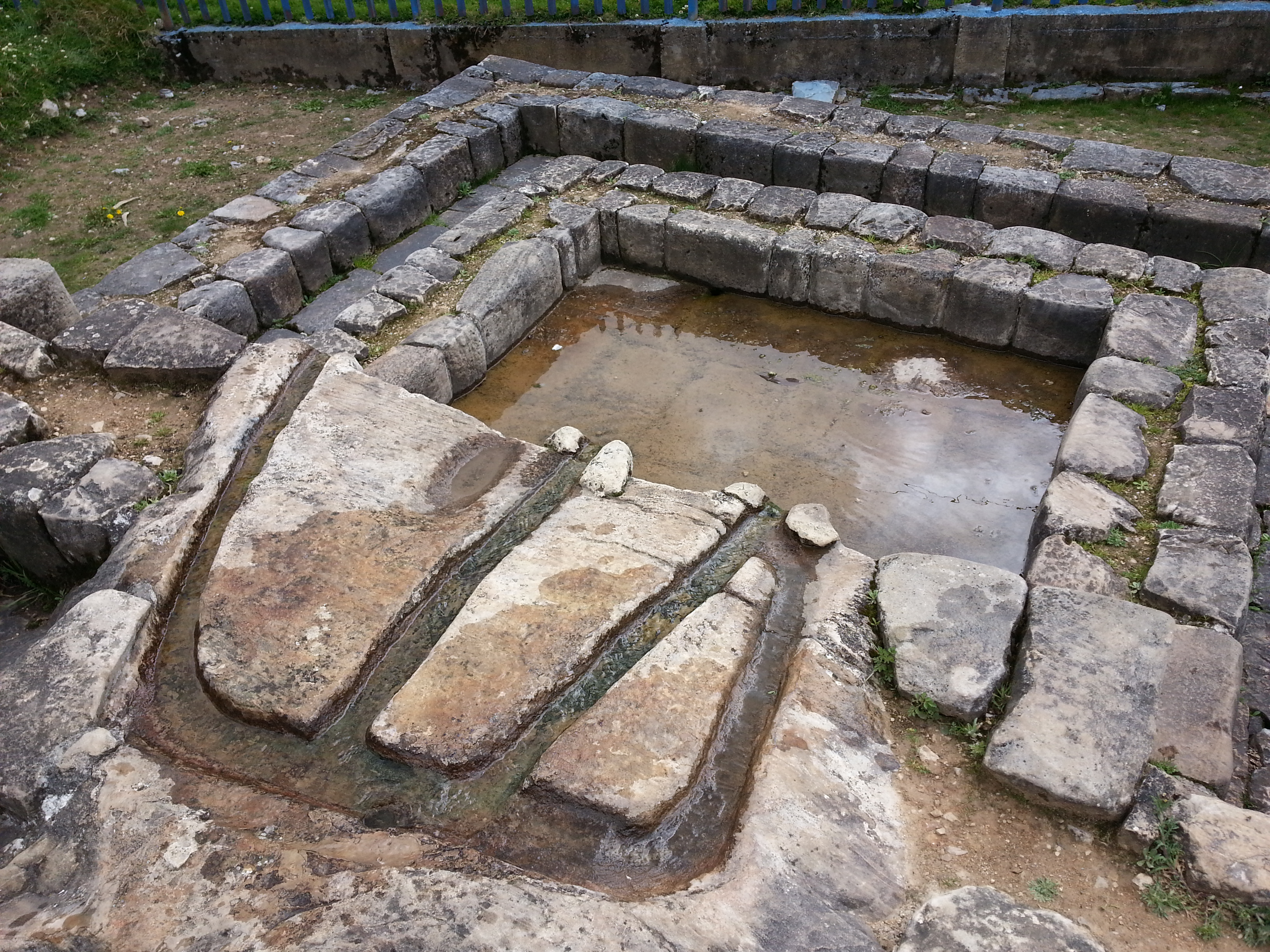 Paqcha, Altar para ceremonias de culto al agua en Huarautambo, parte del complejo arqueológico Inca de Huarautambo, Yanahuanca, Pasco.